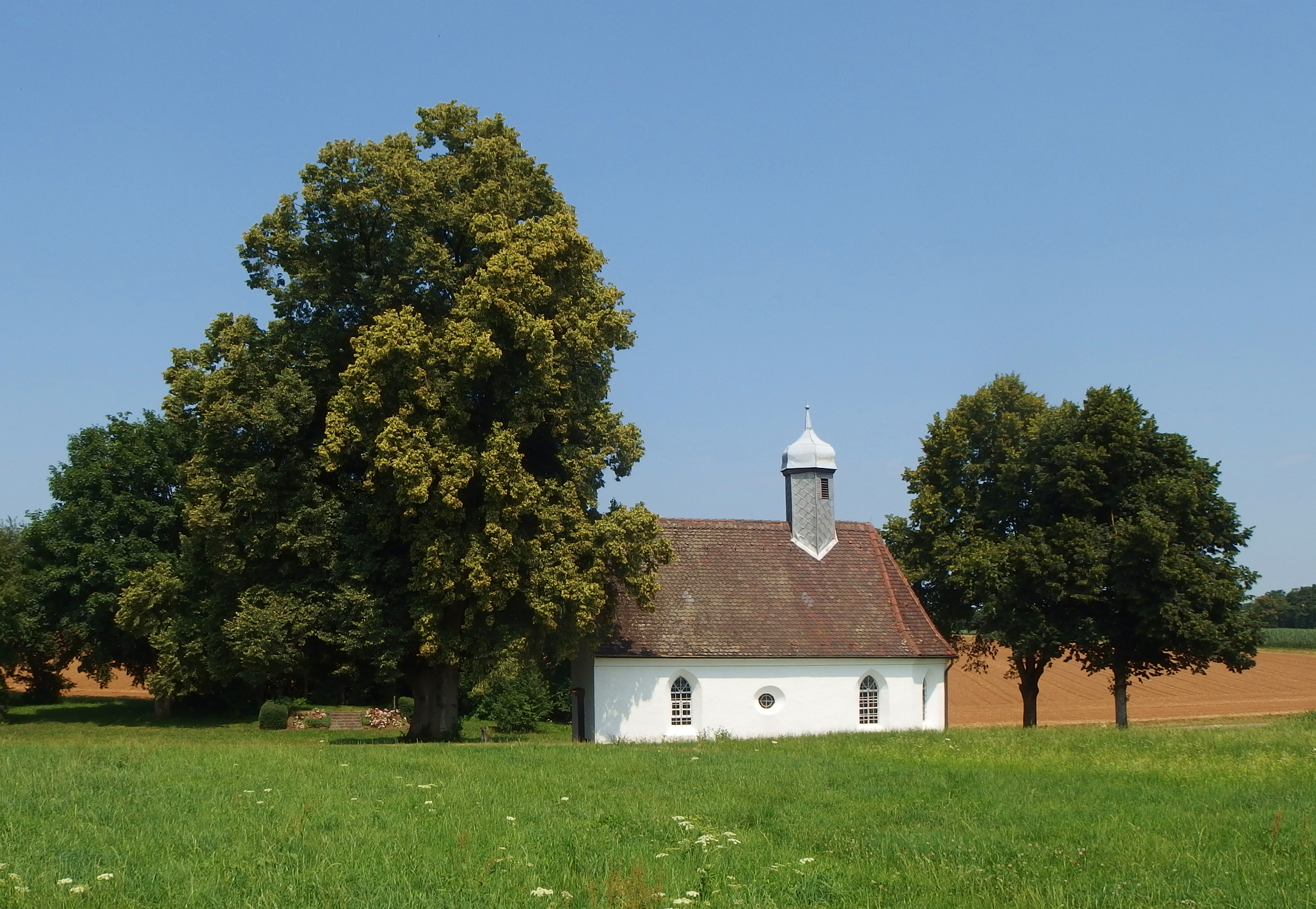 Beiswanger Kapelle, Böbingen an der Rems